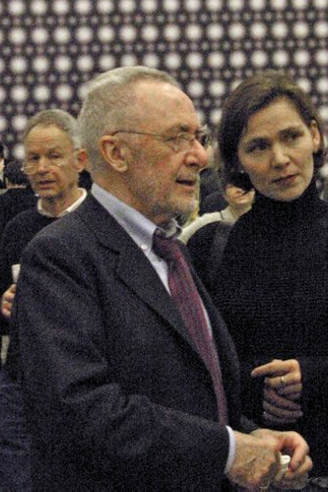 Gerhard Richter anlässlich der Eröffnung seiner Retrospektive am 11.02.2005 in Düsseldorf, K20, vor seinem Werk Strontium, 9x9m.